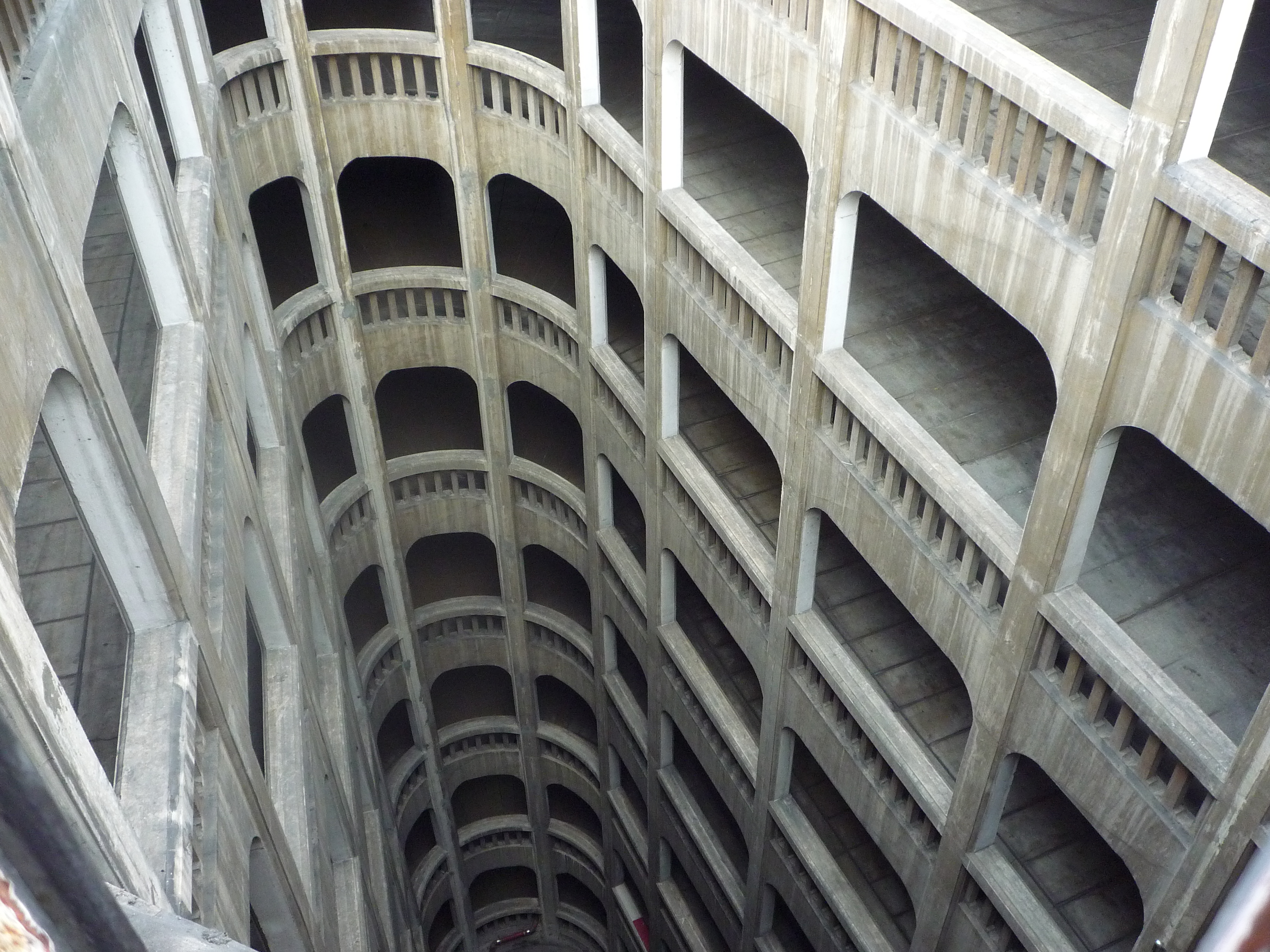 Garage hélicoïdal de Grenoble (1932).